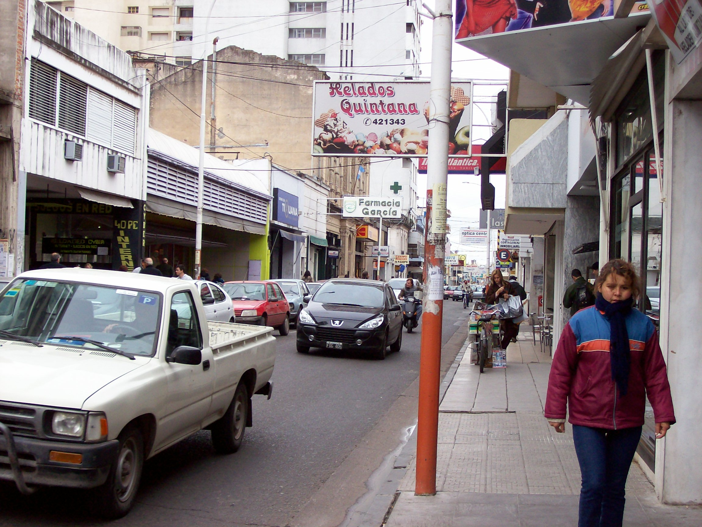 Bartolomé Mitre Street, in downtown San Nicolás de los Arroyos, Argentina.